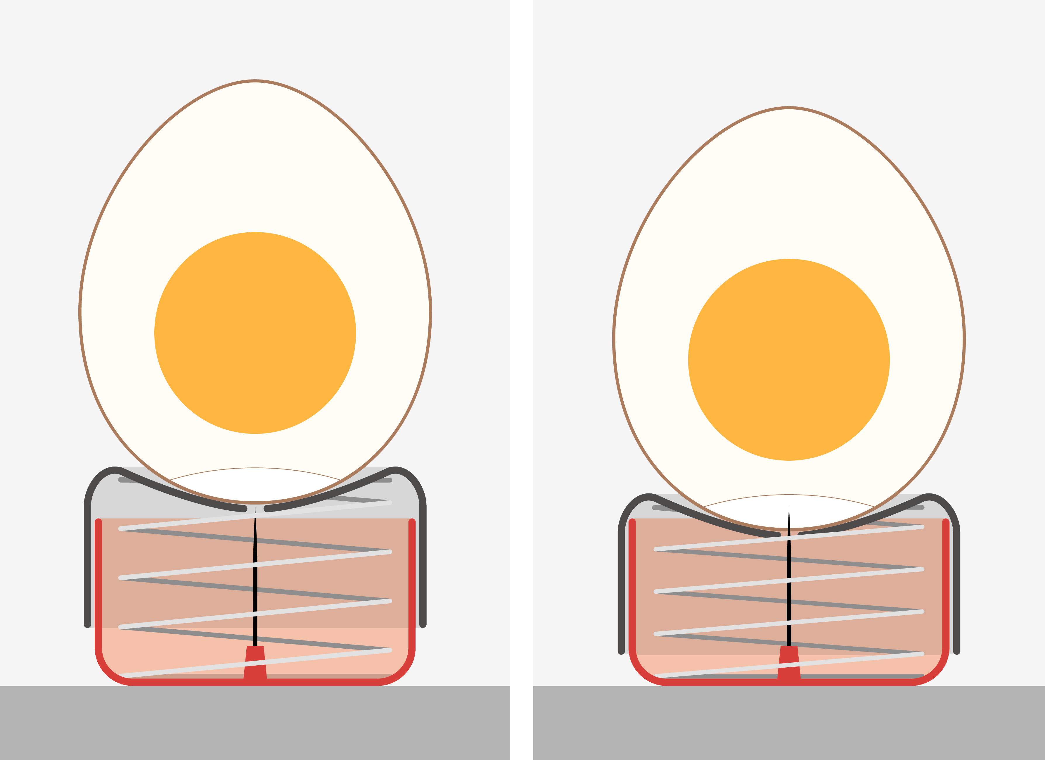 Eierstecher